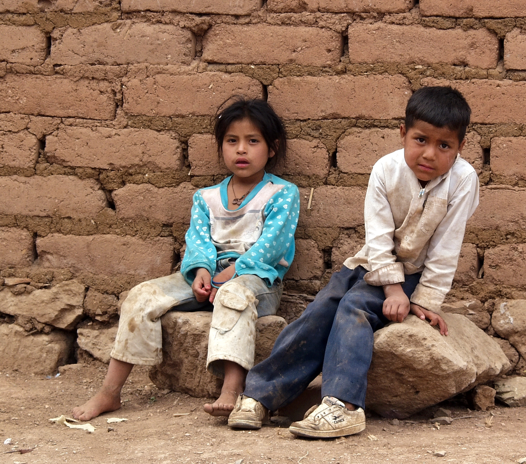 Street children